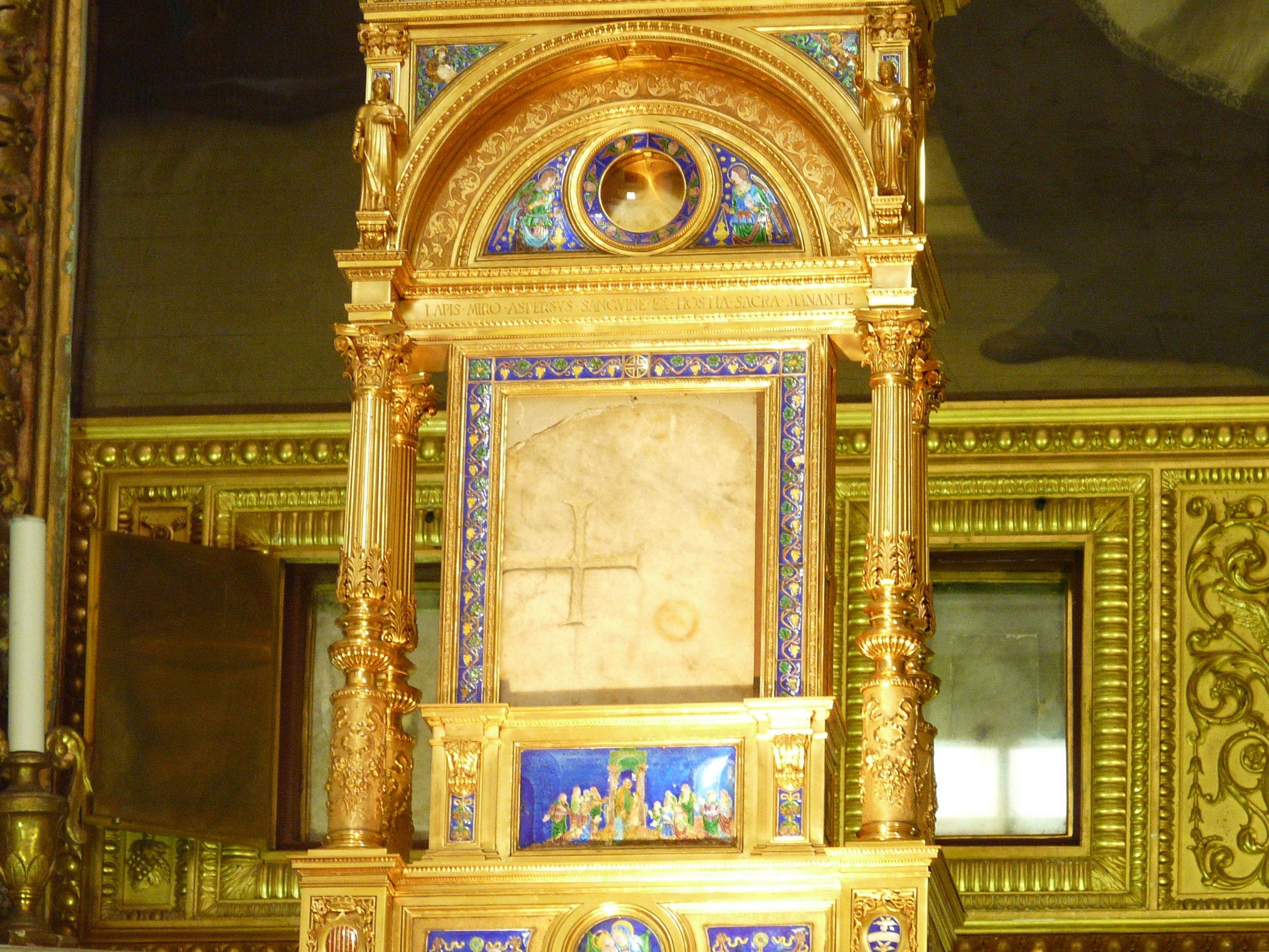 Basilica di Santa Cristina, Bolsena, Lazio, Italia